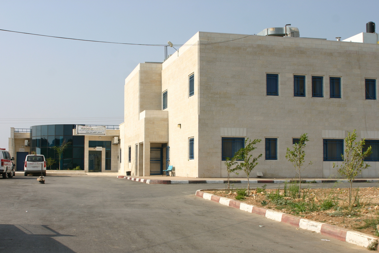 Das Krankenhaus der Stadt Salfeet (Salfit) in Palästina. Object location32° 04′ 25″ N, 35° 10′ 25″ E